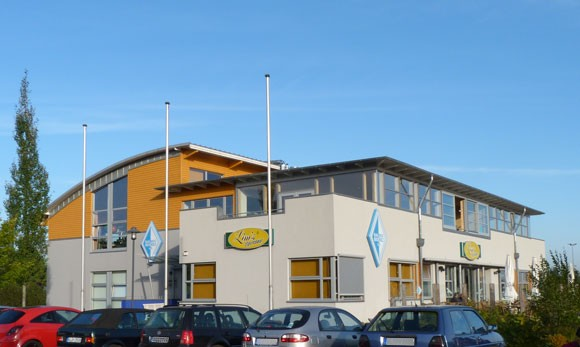 Blau-Weiss Buchholz Hauptgebäude Herbst 2013